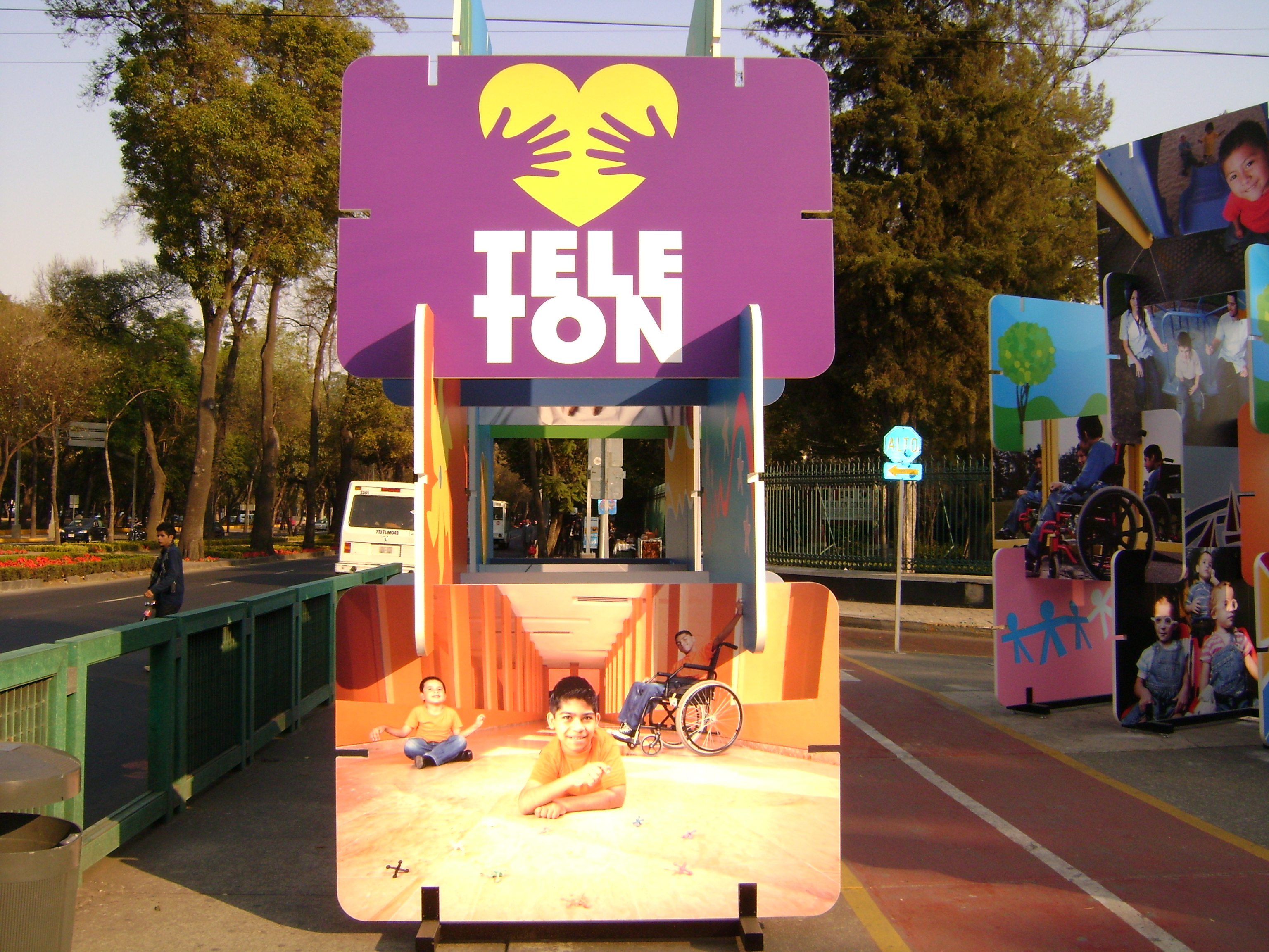 SIMBOLO DEL TELETON UBICADO EN EL PASEO DE LA REFORMA